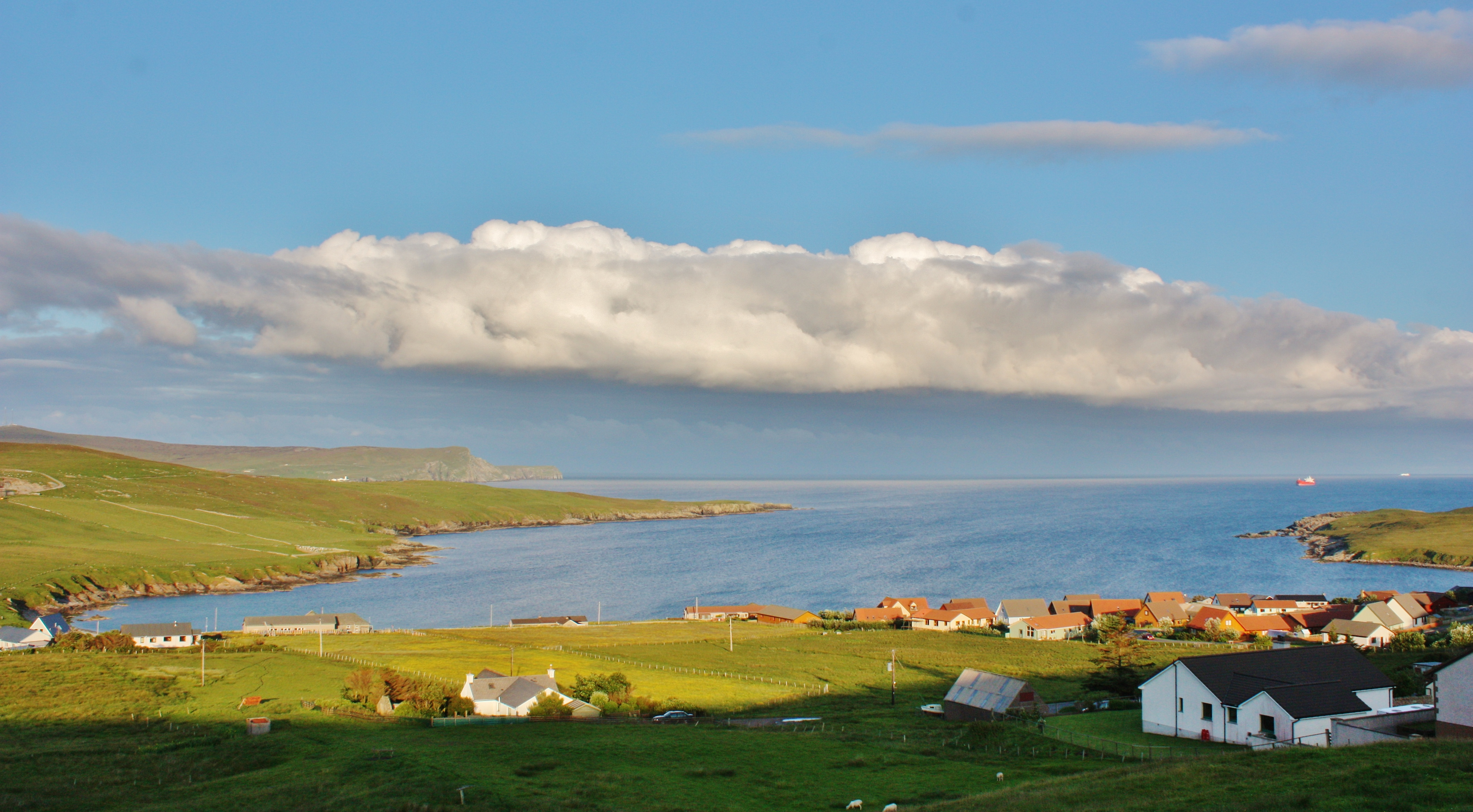 Gulberwick IMG_3157